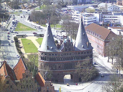 Holstentor in Lübeck, Germany